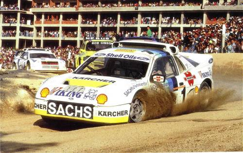 Martin Schanche (N) und sein 650 PS starker Ford RS 200 E2 beim Rallycross-EM-Lauf 1992 in Lousada/Portugal. Eigenes Foto von Benutzer:RX-Guru und von ihm für GFDL-Nutzung freigegeben!